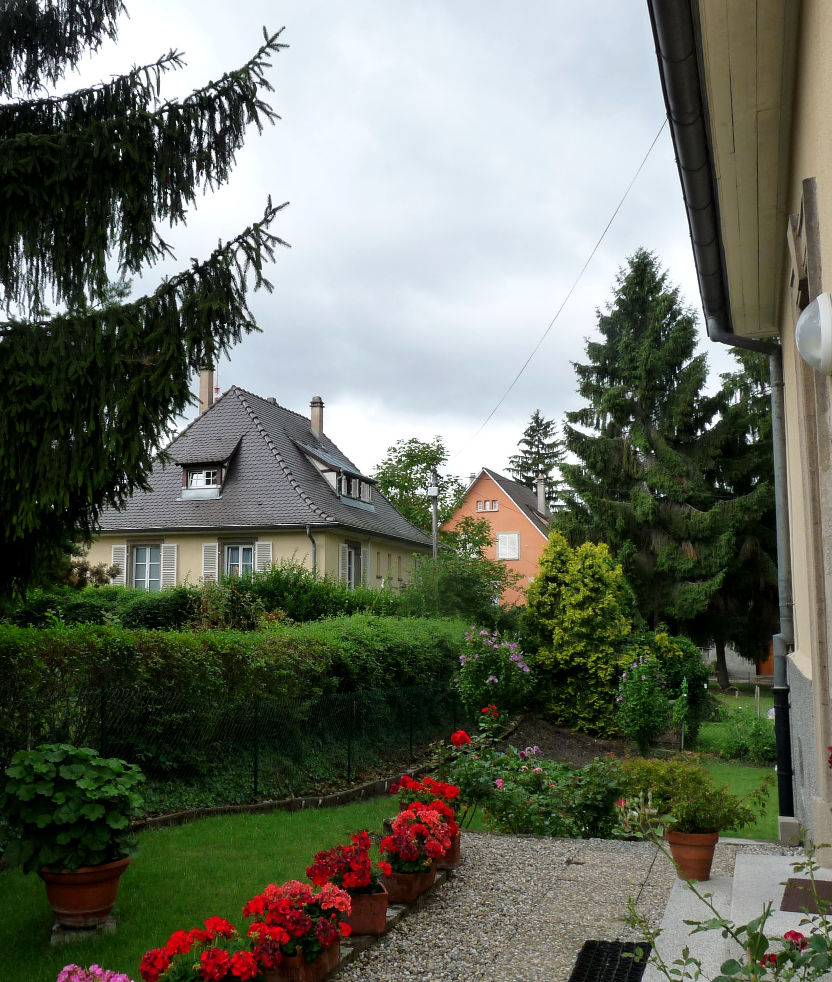 Cité-jardin Ungemach à Strasbourg, créée en 1923 par Charles-Léon Ungemach (1844-1928)